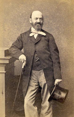 De Ljouwerter keunstskilder Jan van Wicheren (Johan Joeke Gabriël van Wicheren) (29 maart 1808 - 8 oktober 1897)